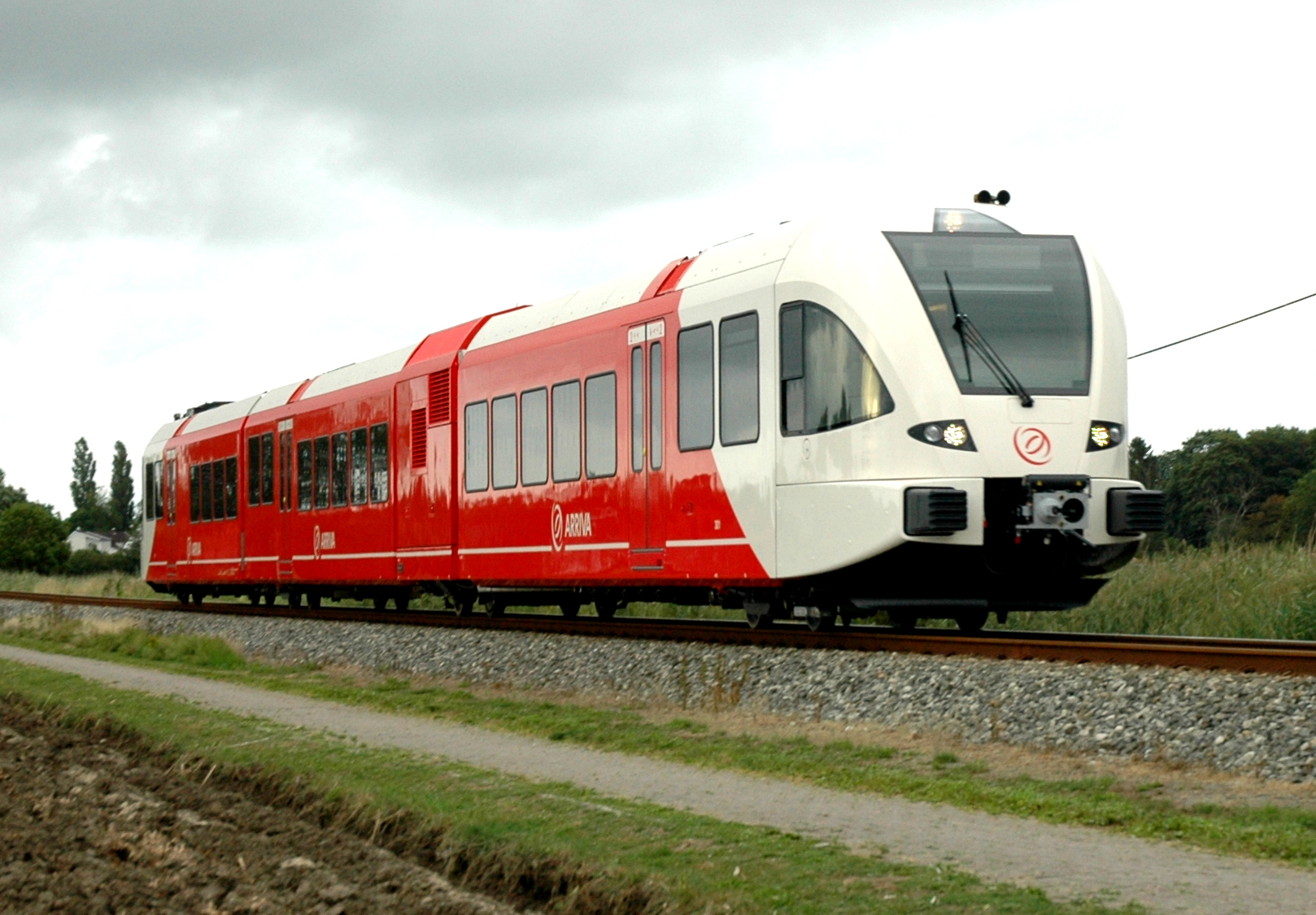 Dit is de eerste Arriva treinstel 10.301 van het type Stadler Rail type GTW in de Charlottenpolder bij Bunde Ost-Friesland. Er zijn door Arriva 99 treinstellen van het type GTM aangeschaft en 22 treinstellen van andere bedrijven overgenomen. Bij Arriva werd de treinstellen Spurt genoemd. Dit is het eerst treinstel in Nederland die later de naam "Riemer en Annie" kreeg.